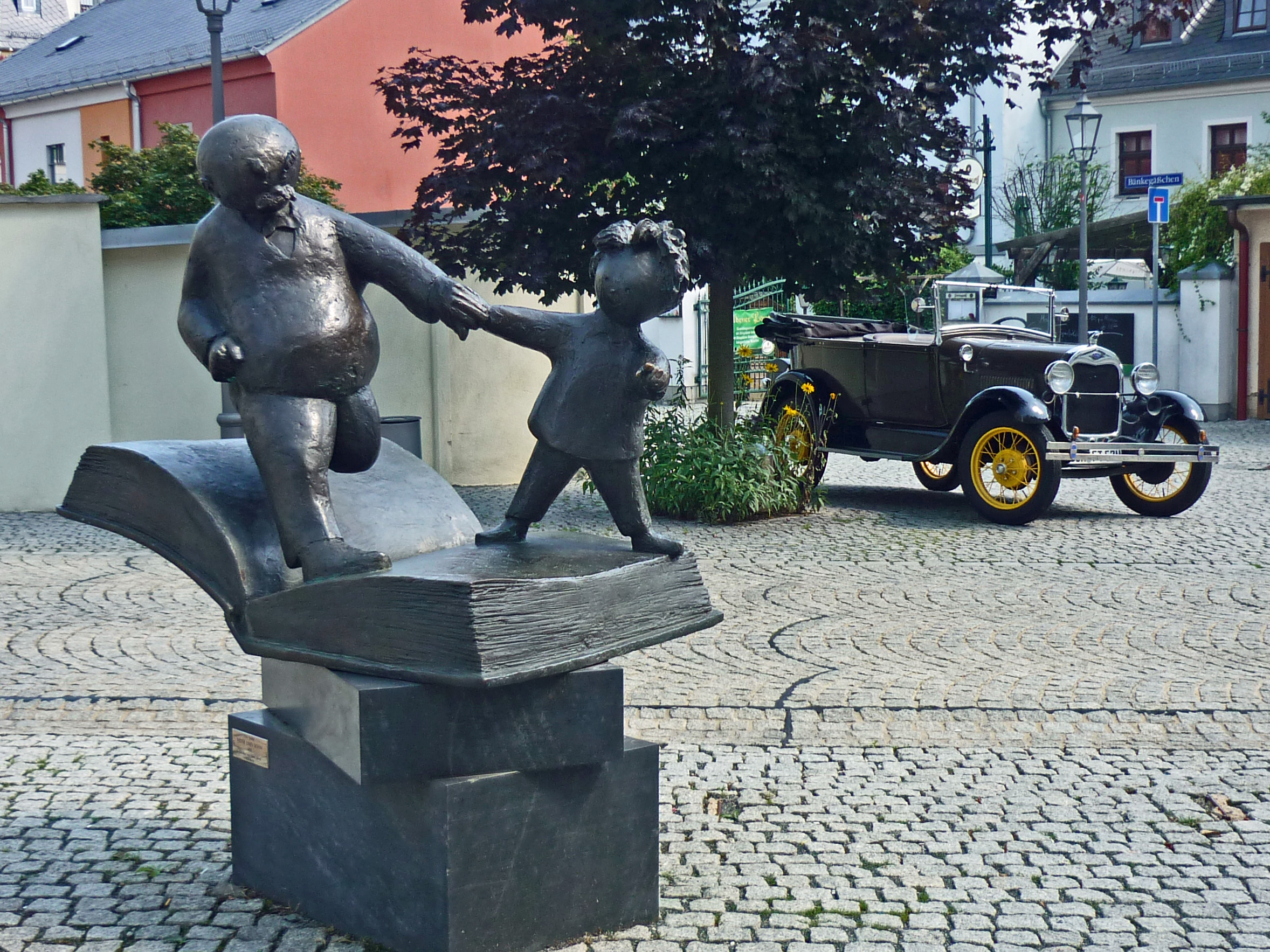 Das Vater-und-Sohn-Denkmal neben dem Erich-Ohser-Haus in Plauen